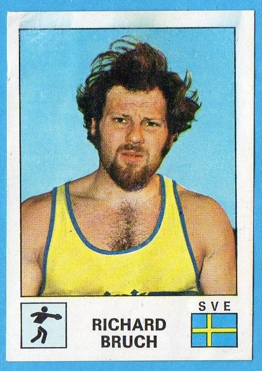 SPORT VEDETTES-PANINI 1974-Figurina n.30- BRUCH (SVE) -ATLETICA LEGGERA-Rec